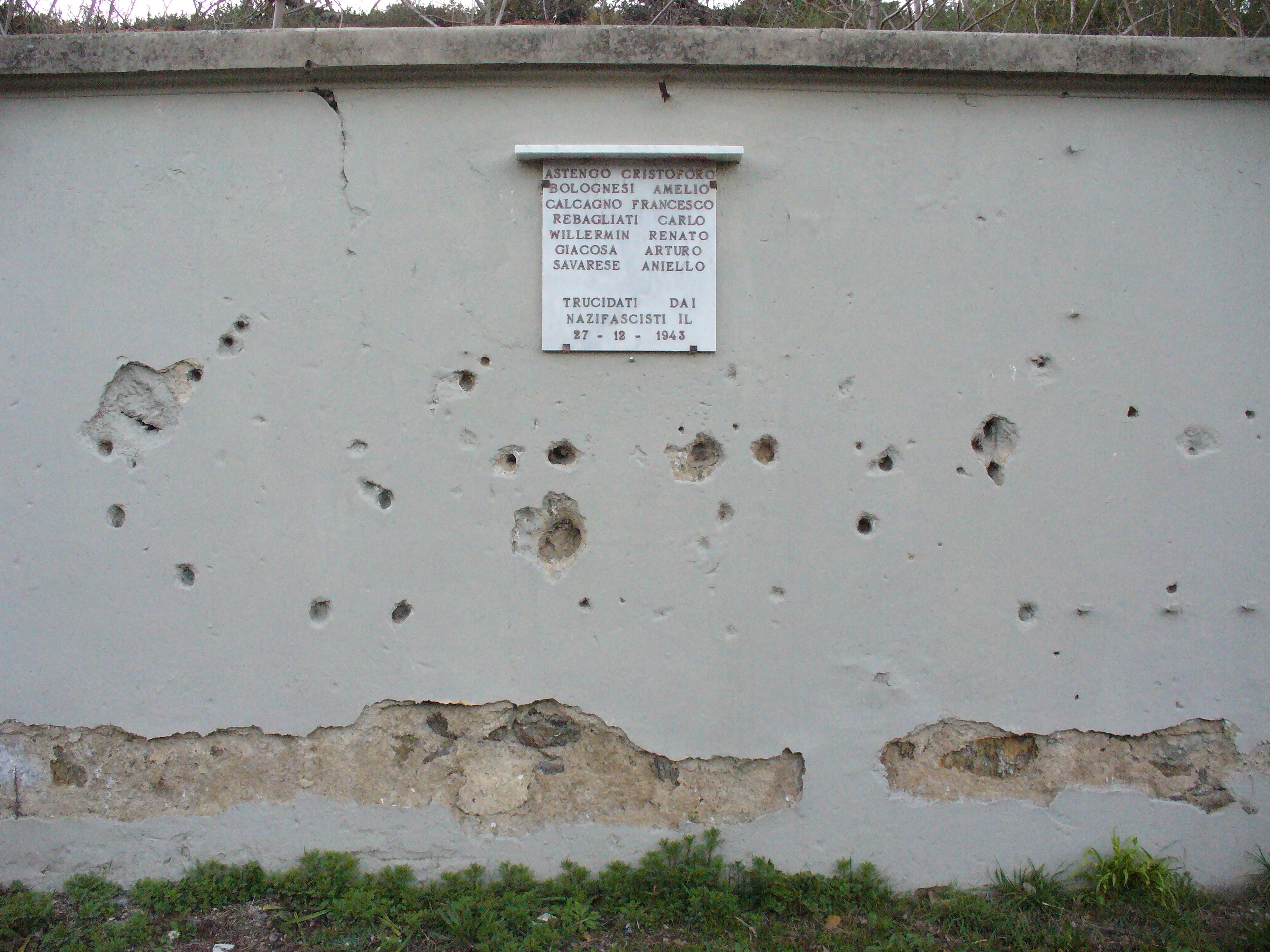 fucilazione nella fortezza della madonna degli angeli a savona da parte dei fascisti